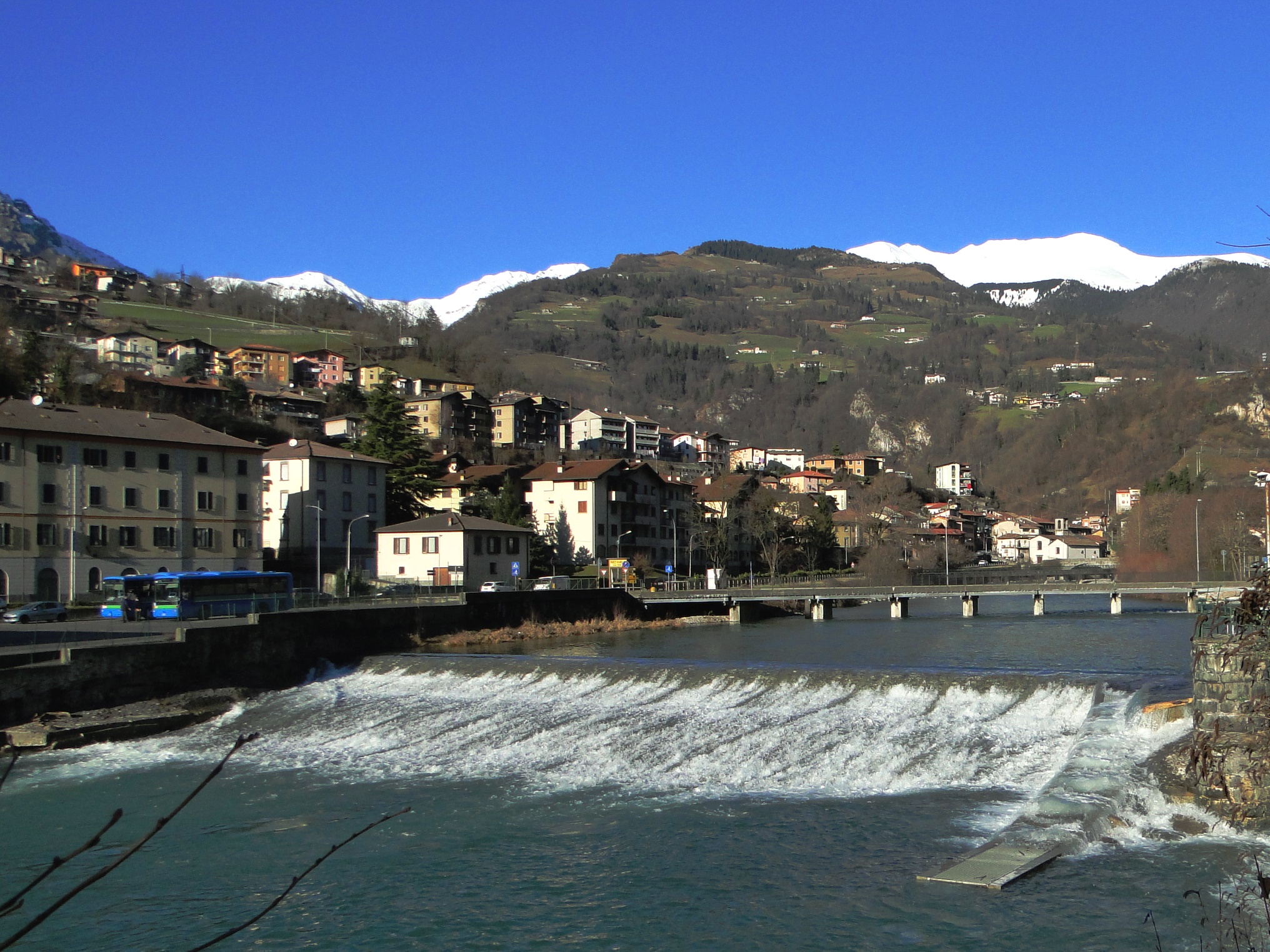 Ponte Nossa (BG), panorama sul lungo Serio